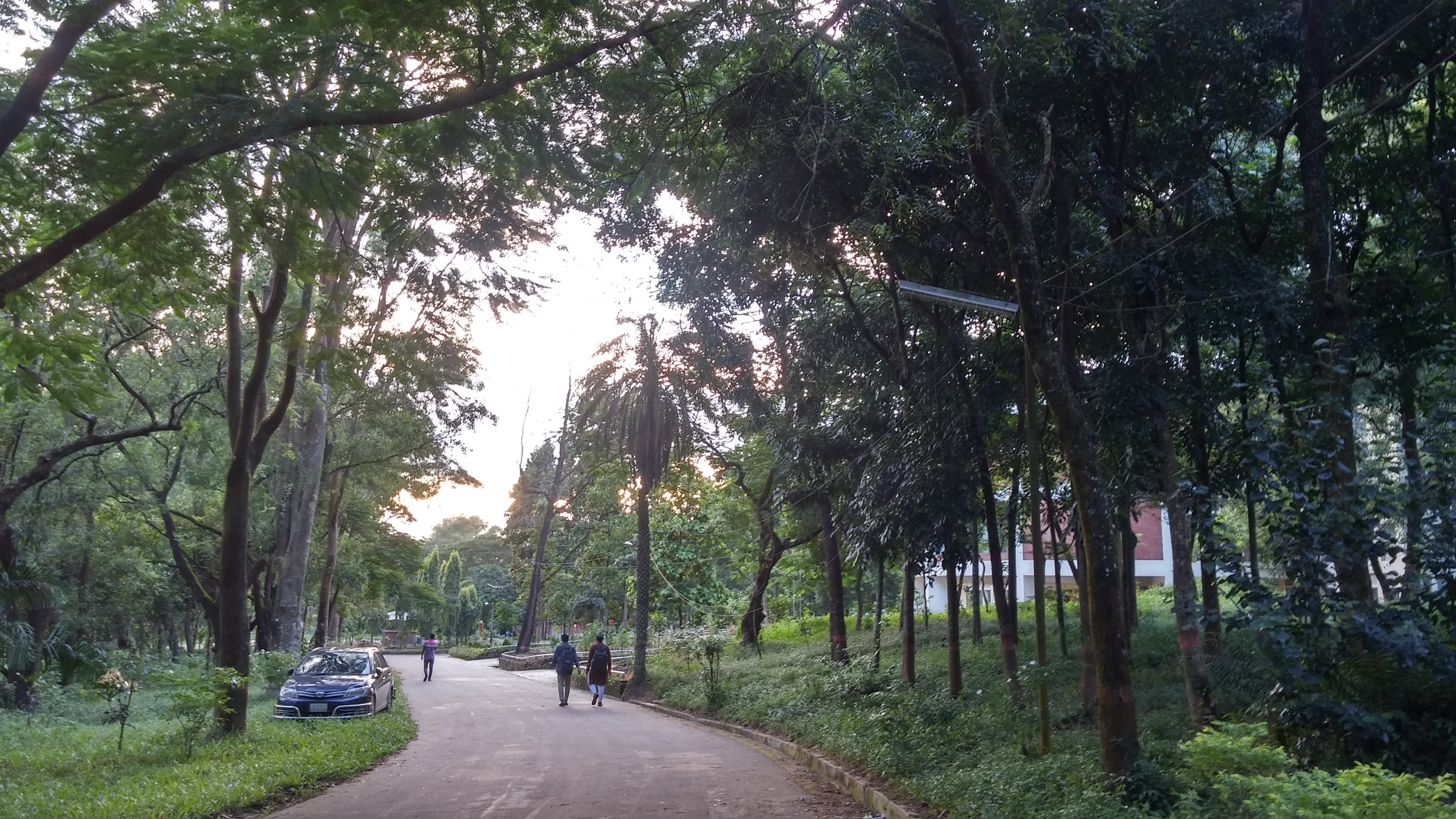 একাডেমিক রোড। Academic Road